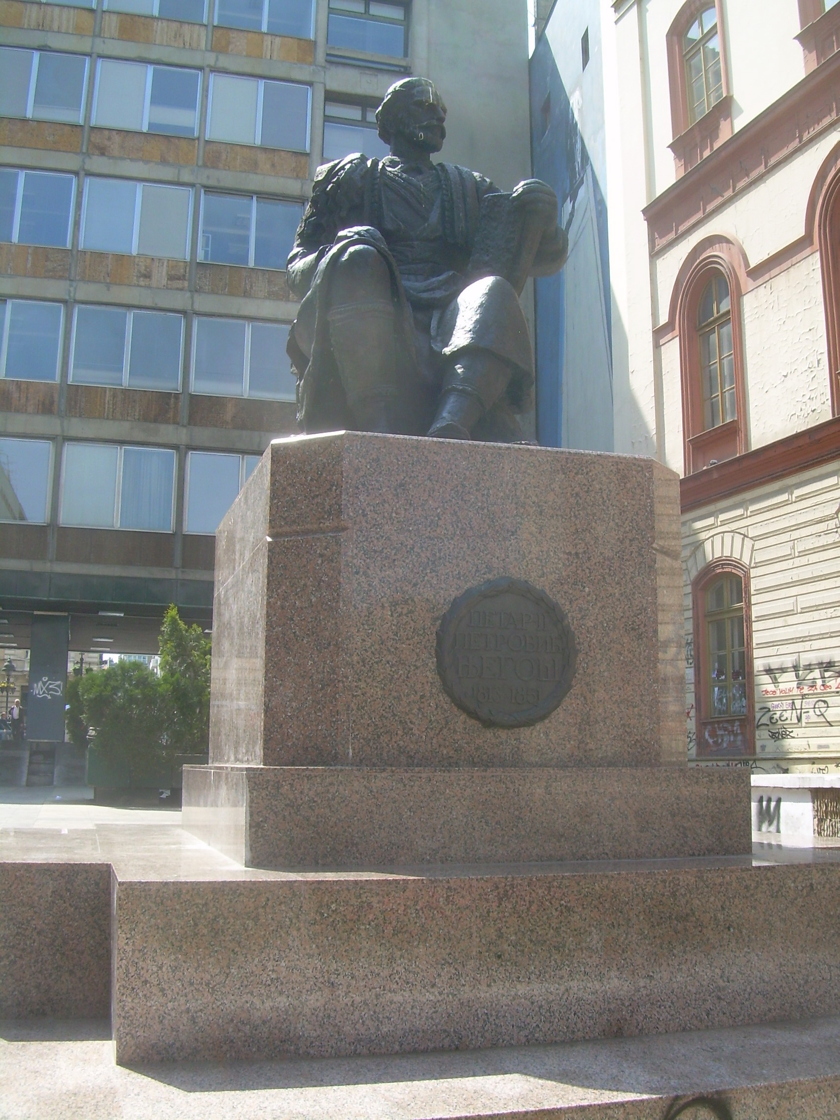 Биста Петрa II Петровићa Његошa у Београду испред зграде Филозофског факултета. Фотографија направљена 18. априла 2010.